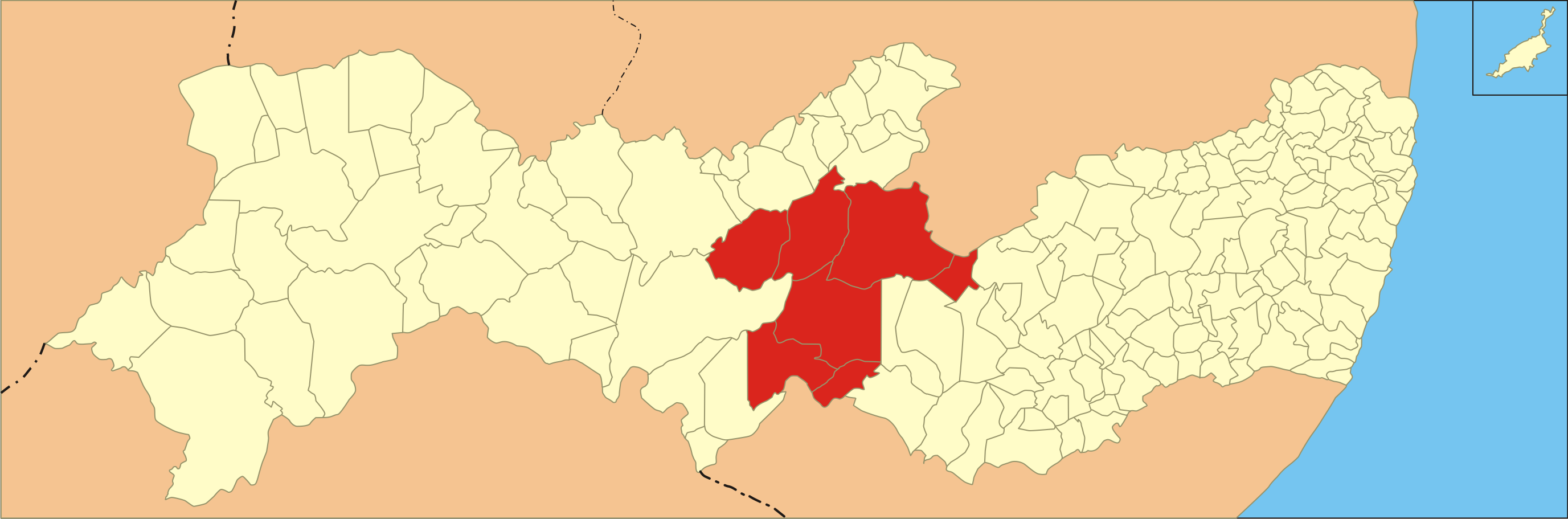 Localização da microrregião no estado de Pernambuco.